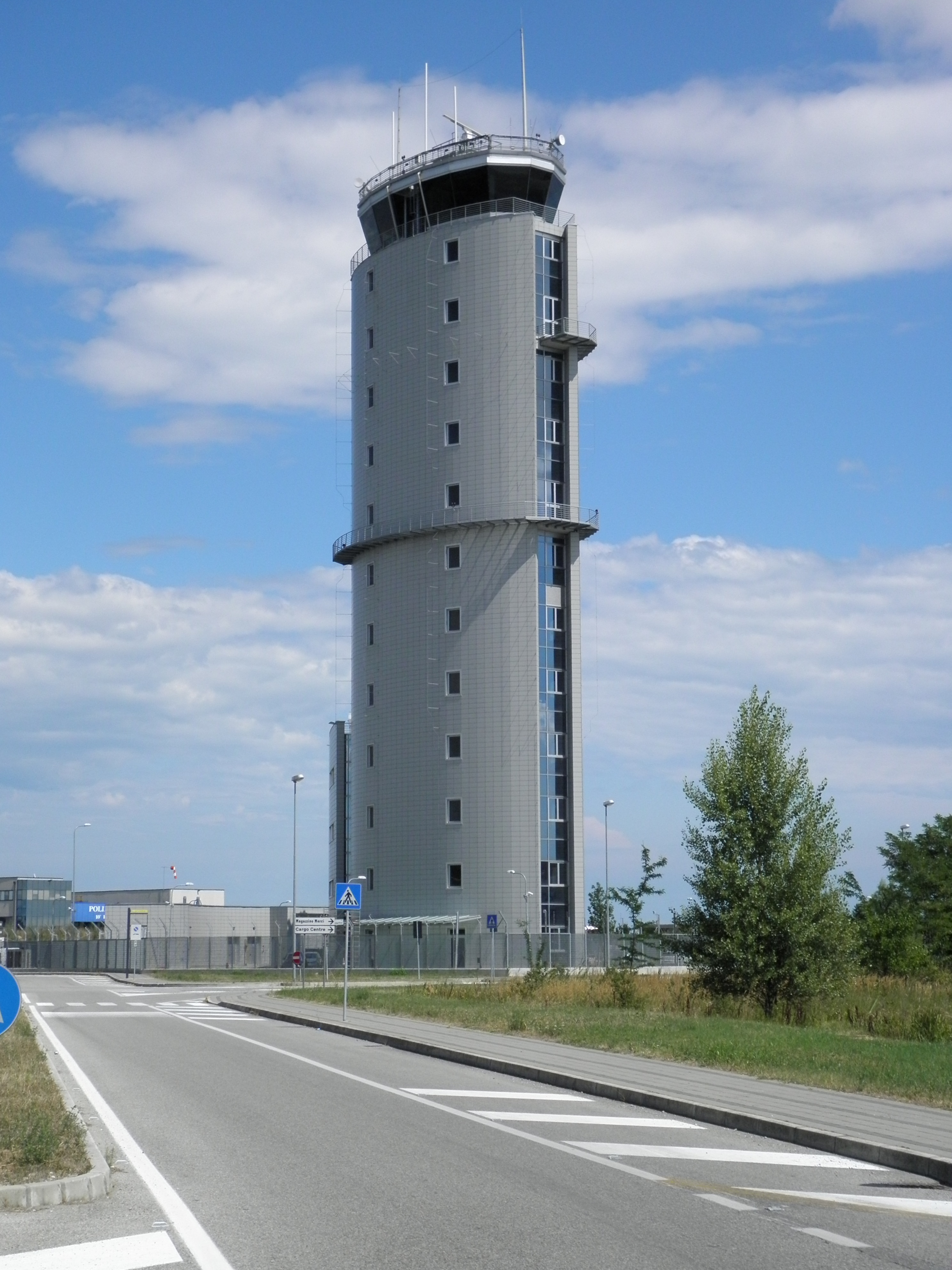 Aeroporto di Venezia-Tessera: torre di controllo.